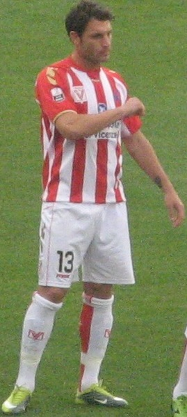 Squadra del Vicenza Calcio. Da sinistra: Gatton Gattoni, Alex Pinardi, Stefano Botta, Evans Soligo, Pasquale Maiorino, Nicholas Giani, Elvis Abbruscato, Nicolò Brighenti, Marco Pisano, Davide Gavazzi e Alberto Frison.